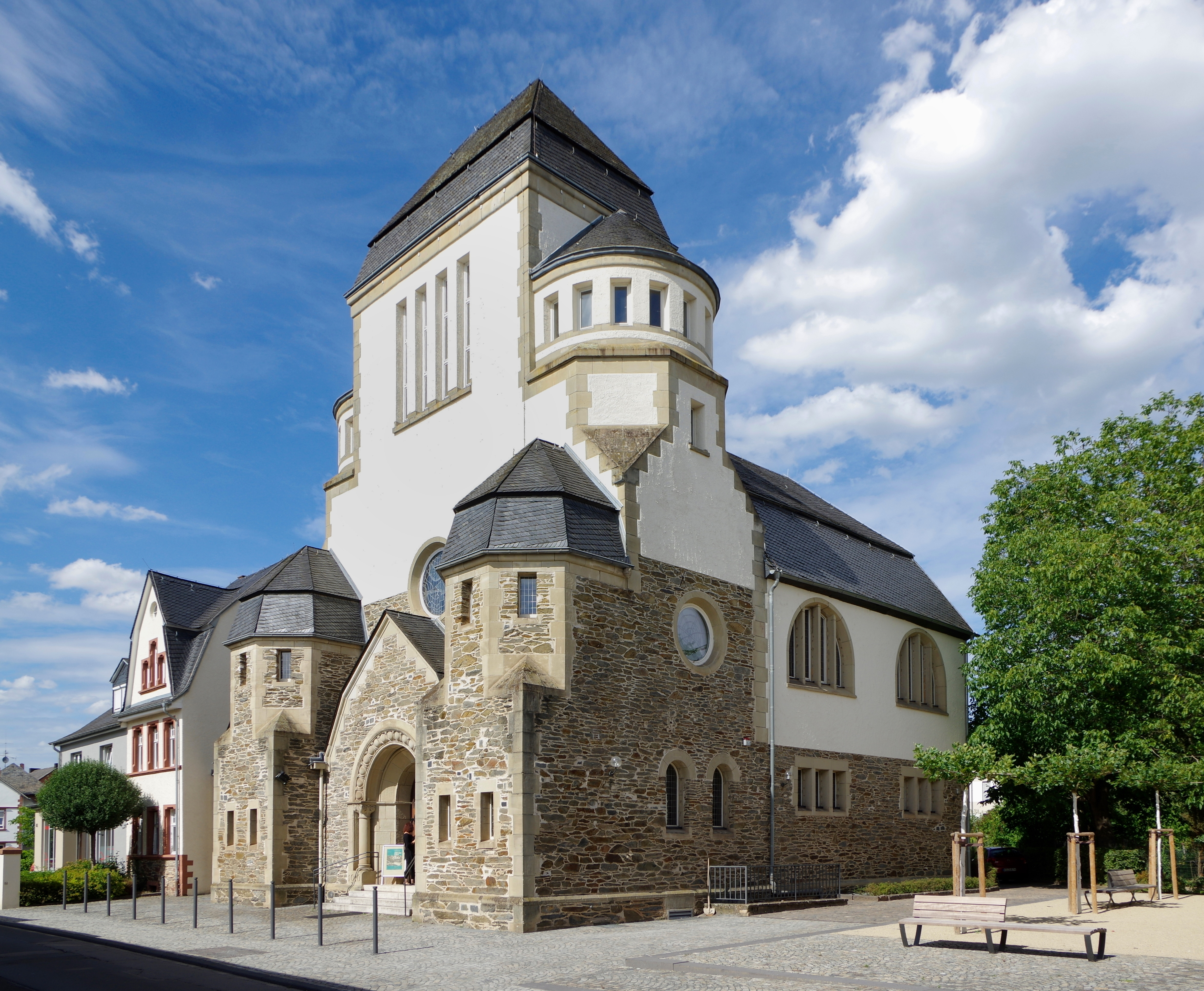 Wittlich, Himmeroder Straße 44, monumentaler romanisierender Bruchstein- und Putzbau, Heimatstil- und Jugendstilmotive, 1910, Architekt Johannes Vienken, 1938 demoliert, seit 1977 Kulturzentrum